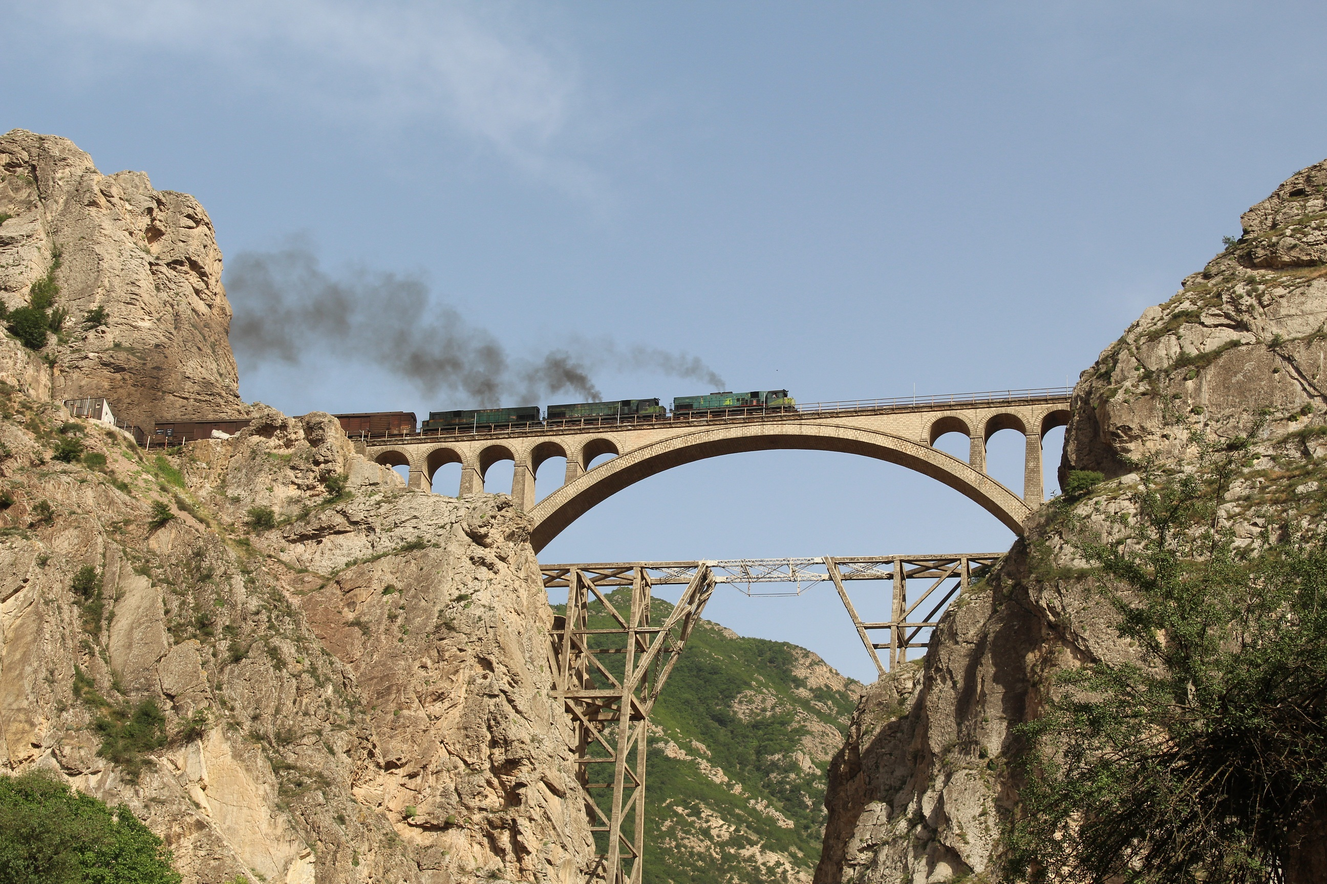 پل ورسک